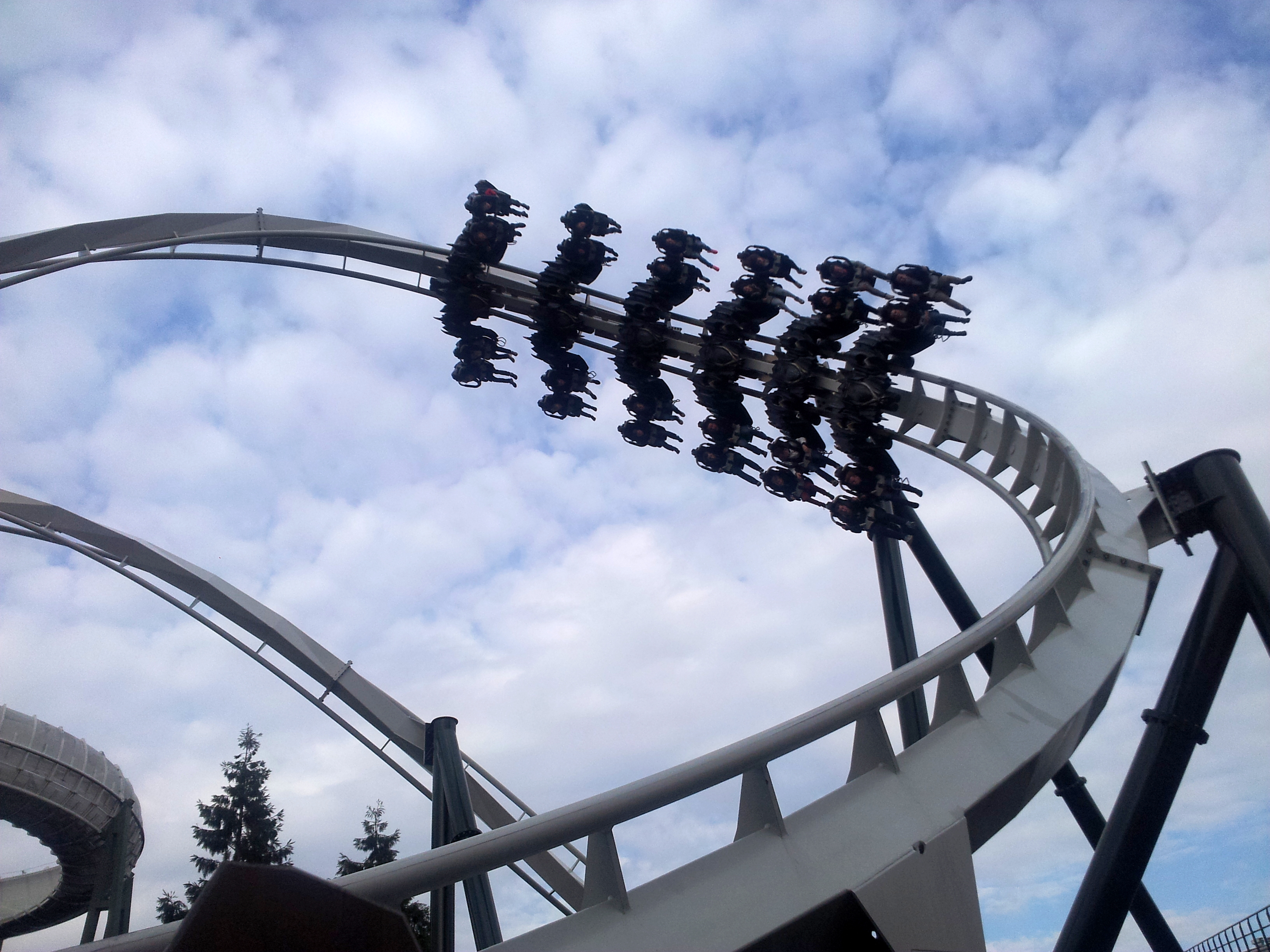 Flug Der Dämonen Wing Coaster im Heide Park Resort